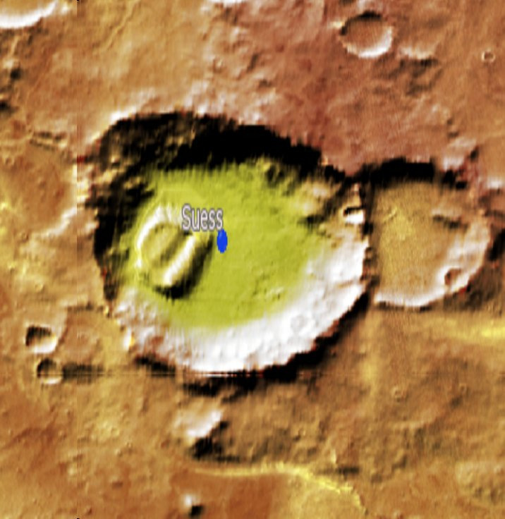 Cráter marciano Suess. (Imagen IAU/USGS/Goddard/A SU/USGS)